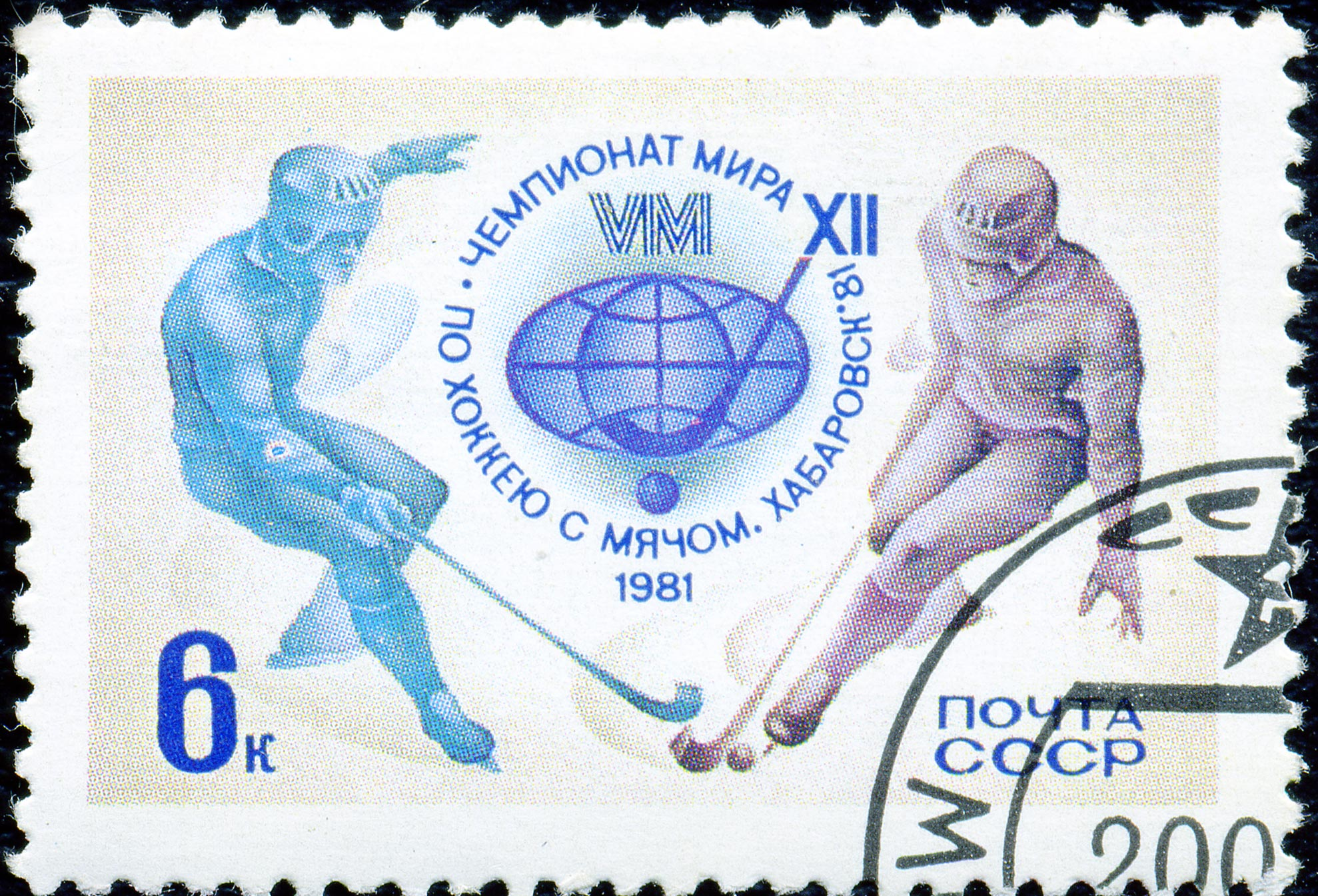 Почтовая марка СССР. 1981. Чемпионат мира по хоккею с мячом